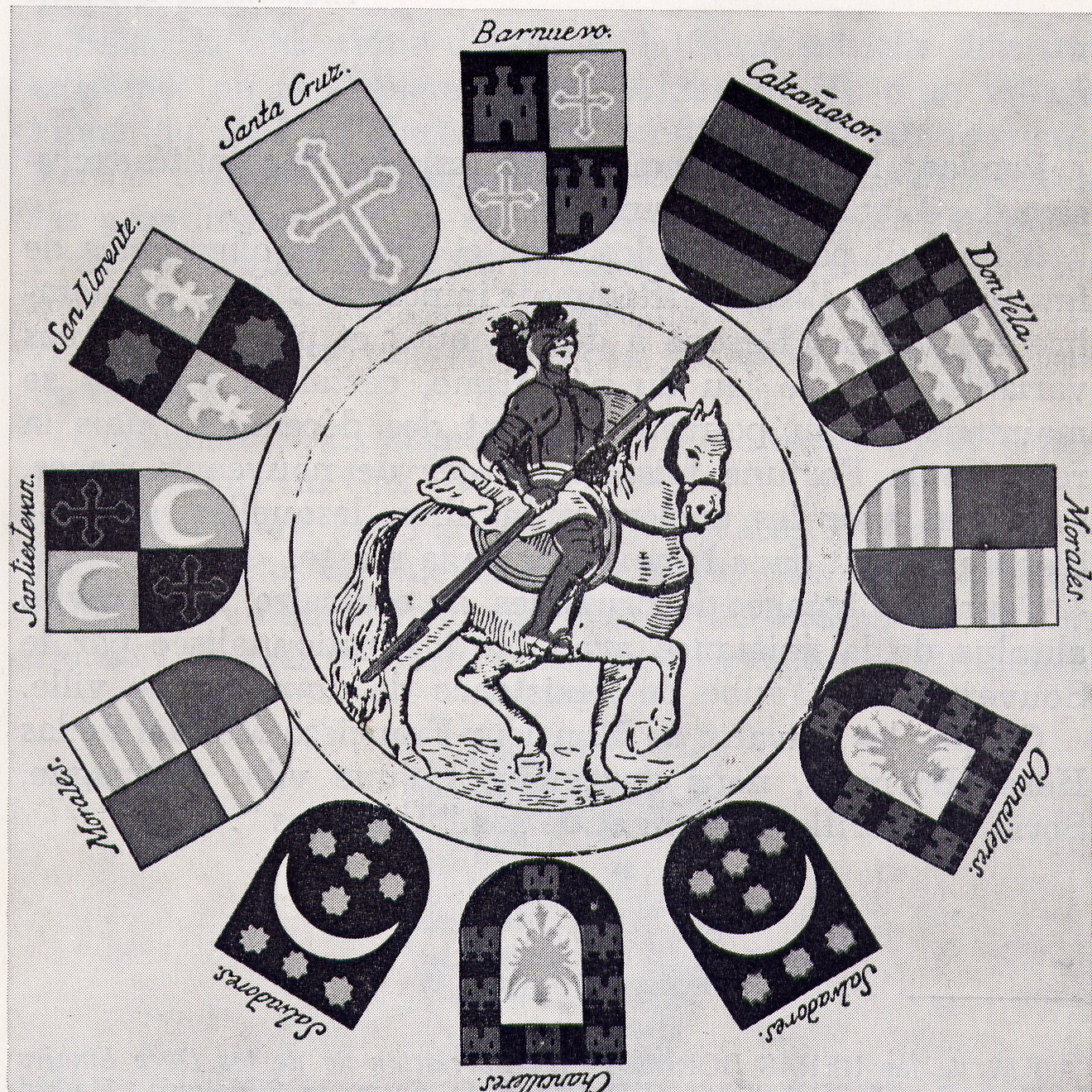 Roue des Douze Lignages de SORIA